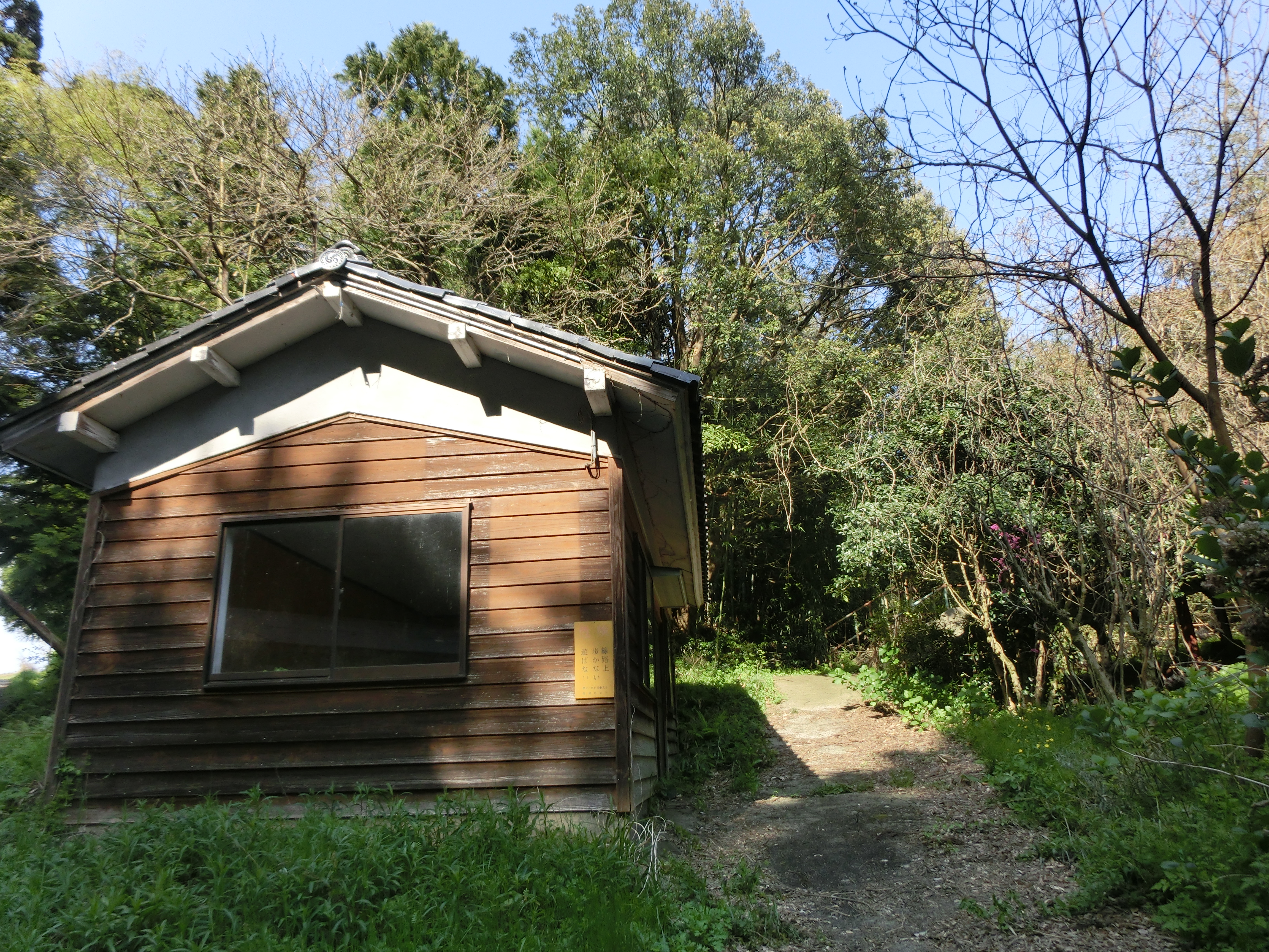 左の建物が待合室、奥にホームへと続く階段がある